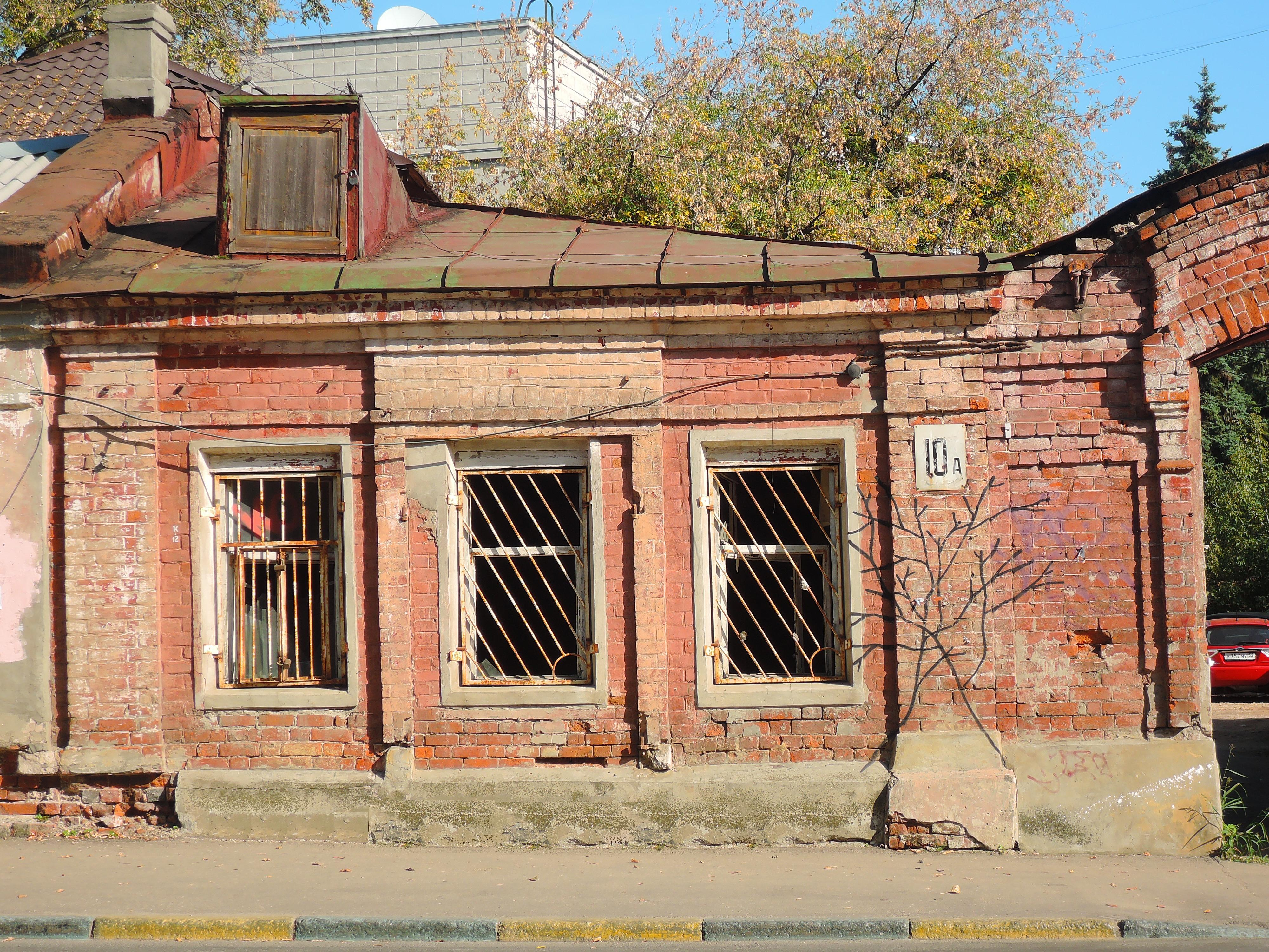 Торговая лавка: улица Ошарская, 10а, Нижний Новгород, Нижегородская область